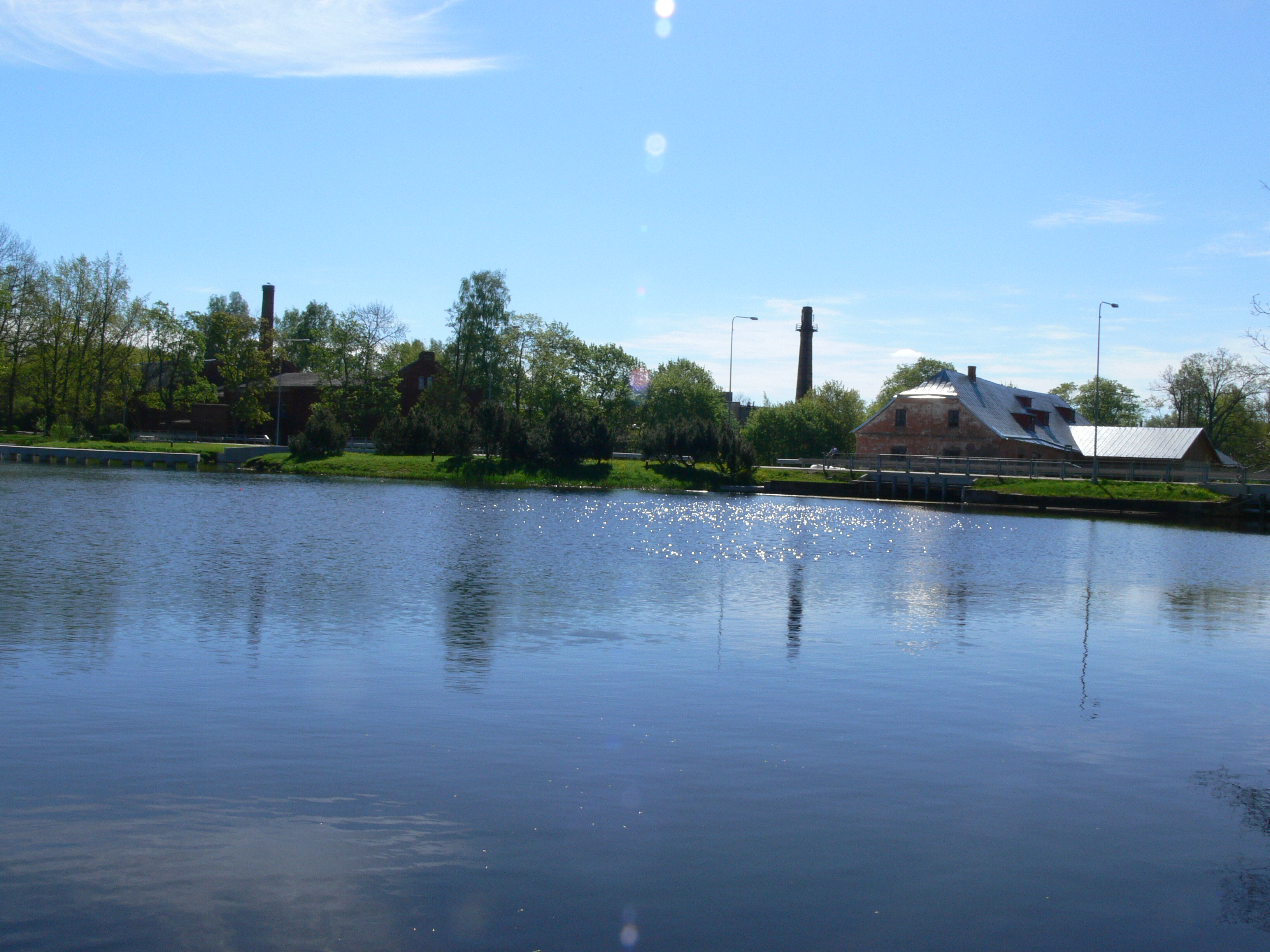 Räpina linn, Põlvamaa